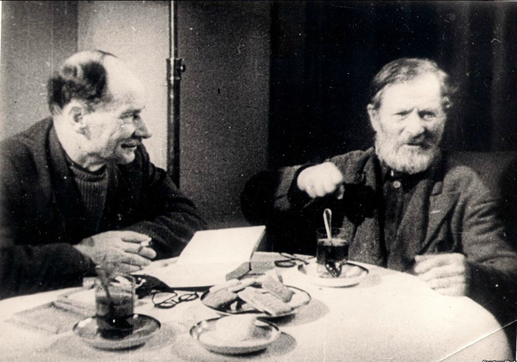 Якуб Колас і дзед Талаш у працоўным кабінеце пісьменніка